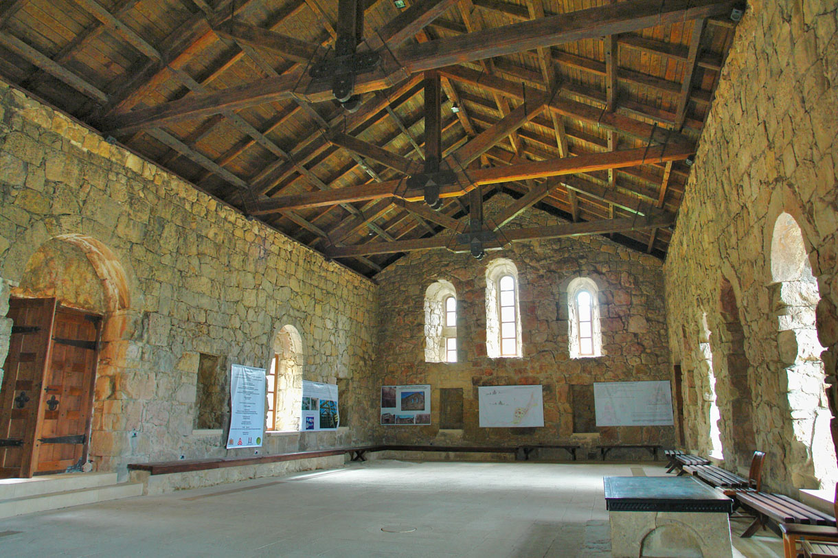 Gelati, academia Georgia